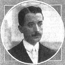 Fotografía del escritor español José Fernández del Villar publicada en 1913 con motivo del estreno en el Teatro de la Princesa de su entremés El caprichito